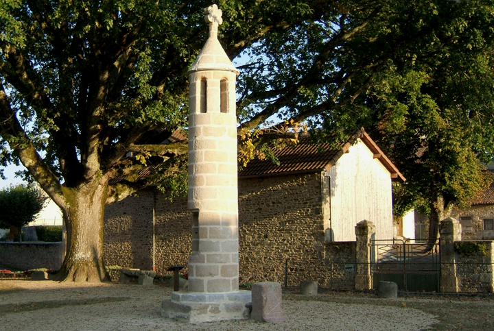 Rancon, département de la Haute-Vienne, région Limousin, France. Lanterne des morts (XIIe), inscrite à l'inventaire supplémentaire des Monuments Historiques par arrêté du 16 juillet 1925, avec un socle de deux marches, la table a disparu. Elle se situe dans l'ancien cimetière, désaffecté vers 1872, transformé en jardin public.